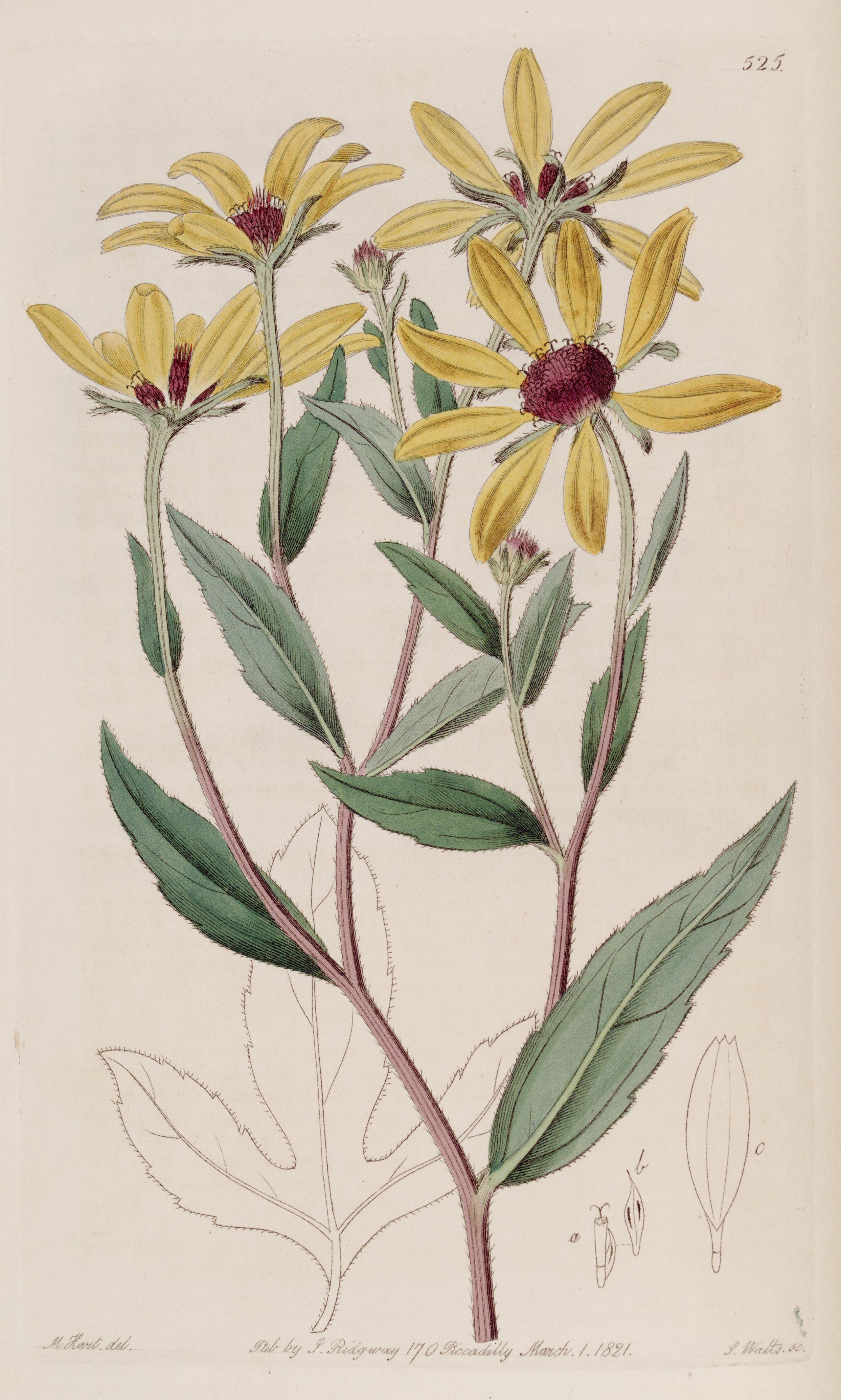 Legende: Oberer Teil der Pflanze. Unteres Stängelblatt. a Röhrenblüte mit Spreublatt. 2 Spreublatt. 3 Strahlenblüte.